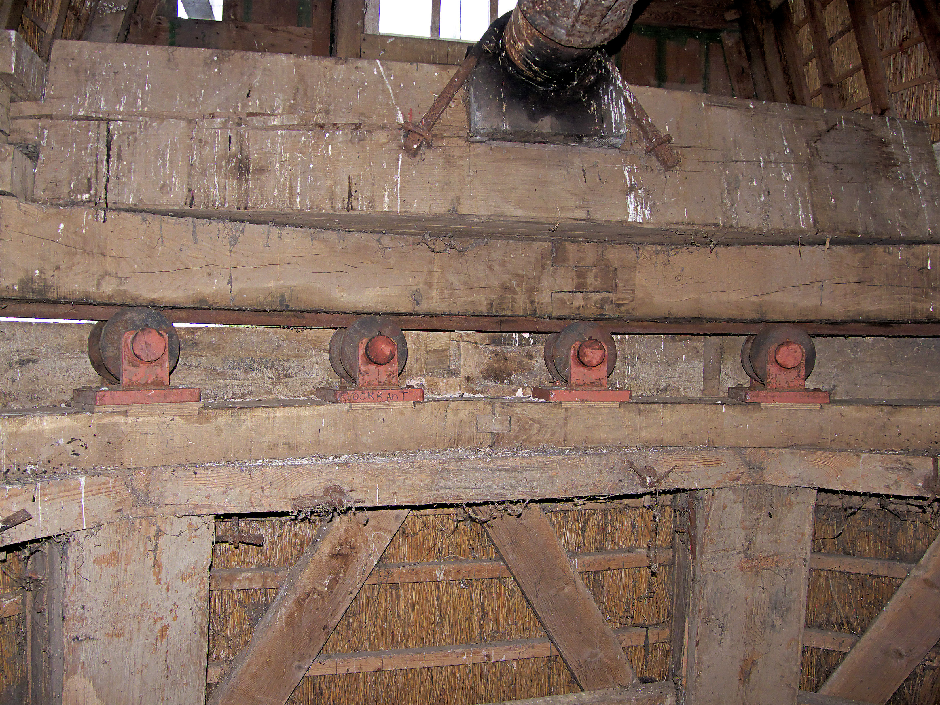 Molen De Hoop, Oldebroek kruiwerk met zogenaamde mosterdpotjes